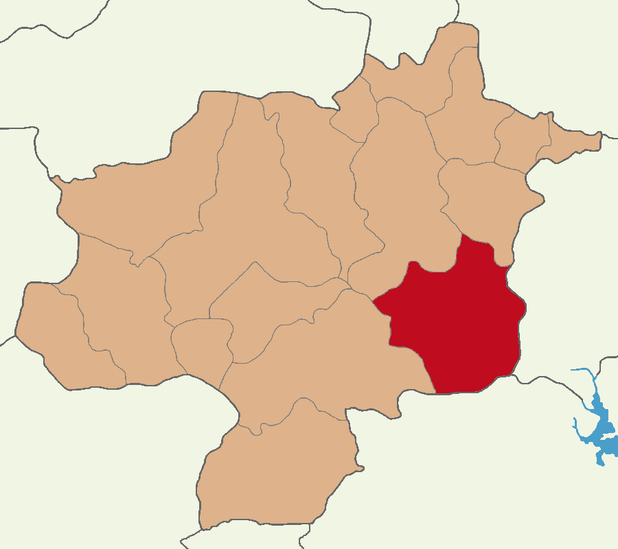 Divriği ilçesinin konumu